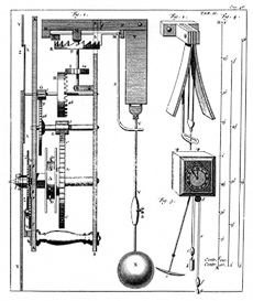 Slingerklokontwerp van Christiaan Huygens (14 april 1629 – 8 juli 1695)